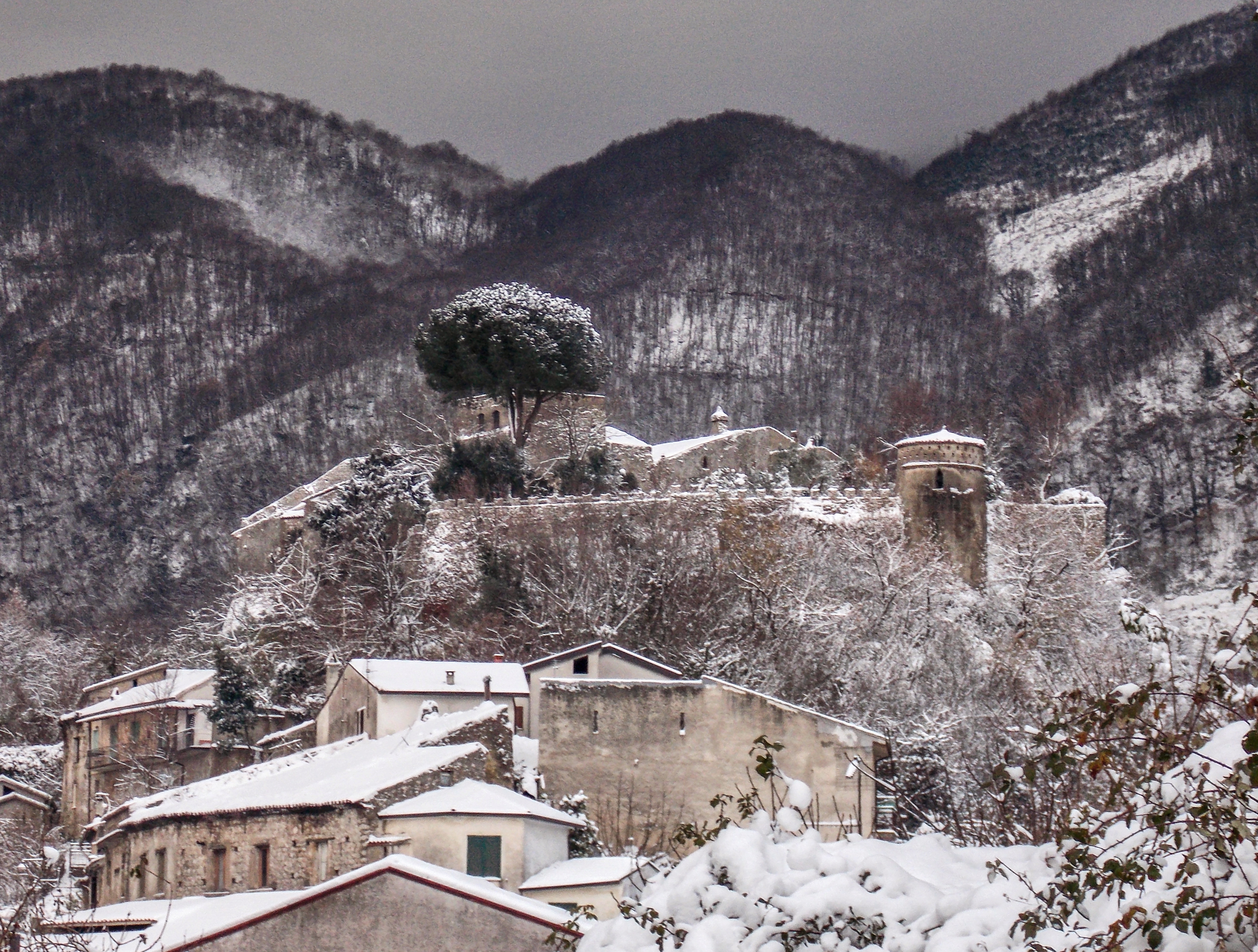 Castello Pignatelli della Leonessa a San Martino Valle Caudina (AV).